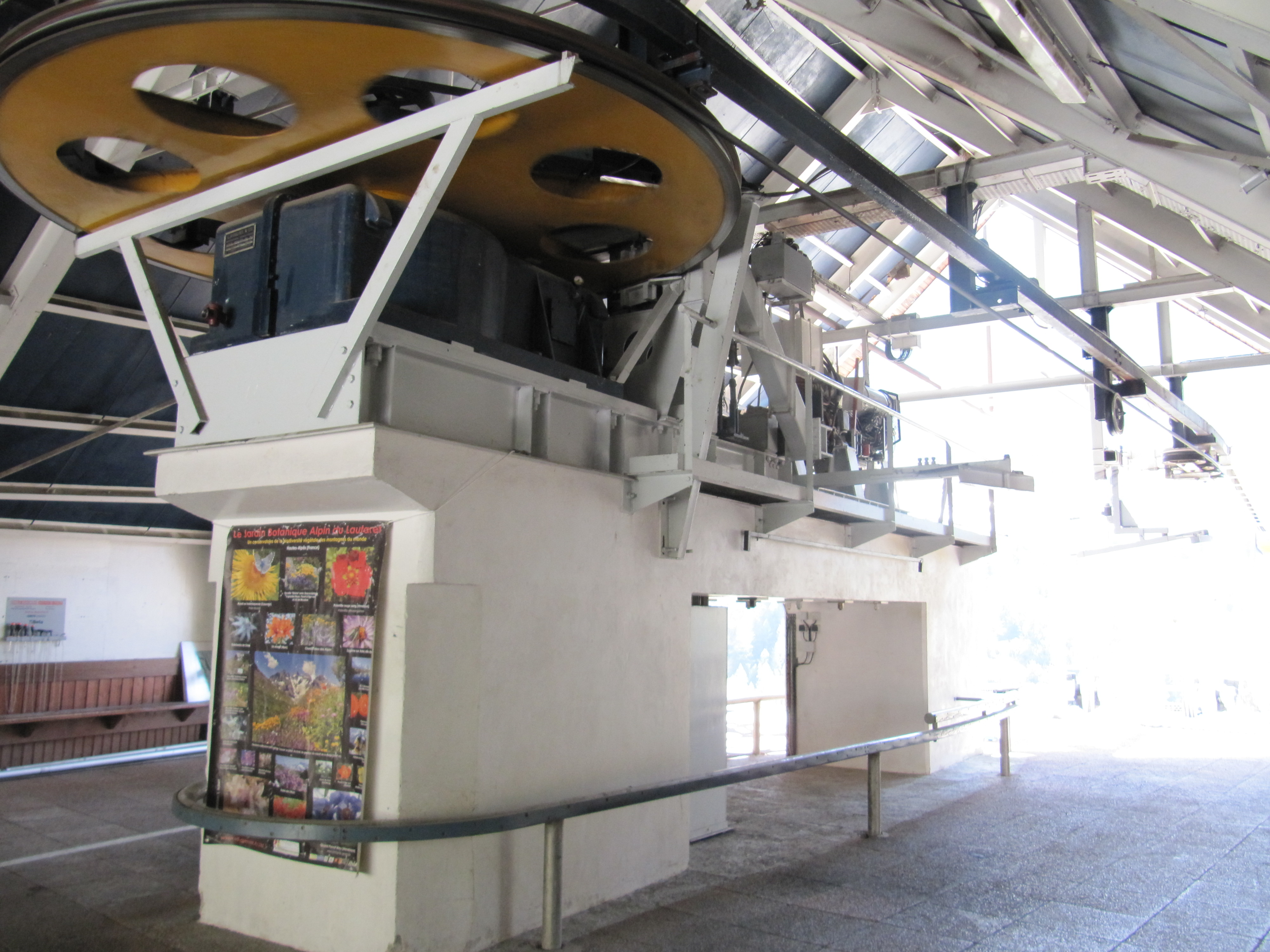 L'intérieur de la gare aval du 2S de la Grave.